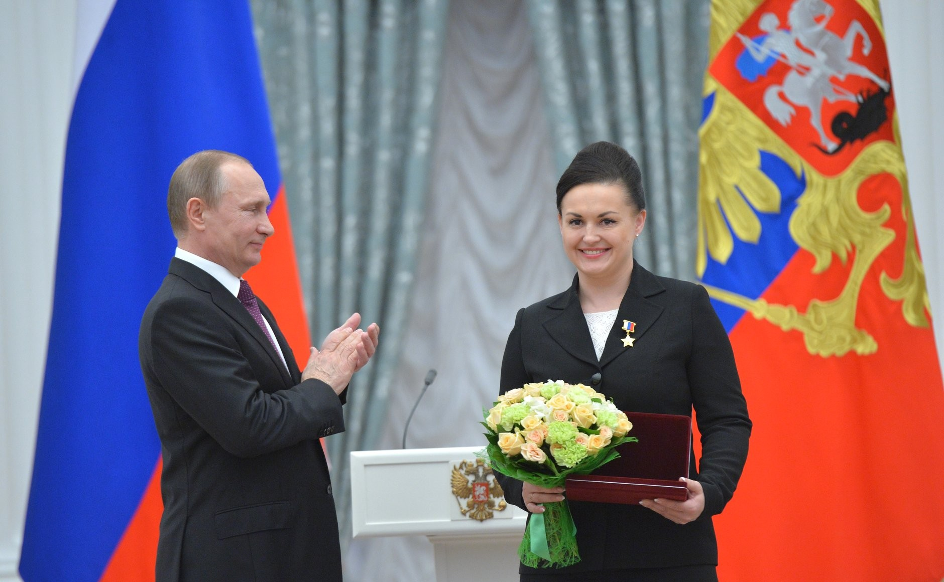 Церемония вручения государственных наград Российской Федерации. Звание Героя Российской Федерации и почётное звание «Лётчик-космонавт Российской Федерации» присвоено космонавту-испытателю отряда космонавтов Центра подготовки космонавтов имени Ю. А. Гагарина Елене Серовой